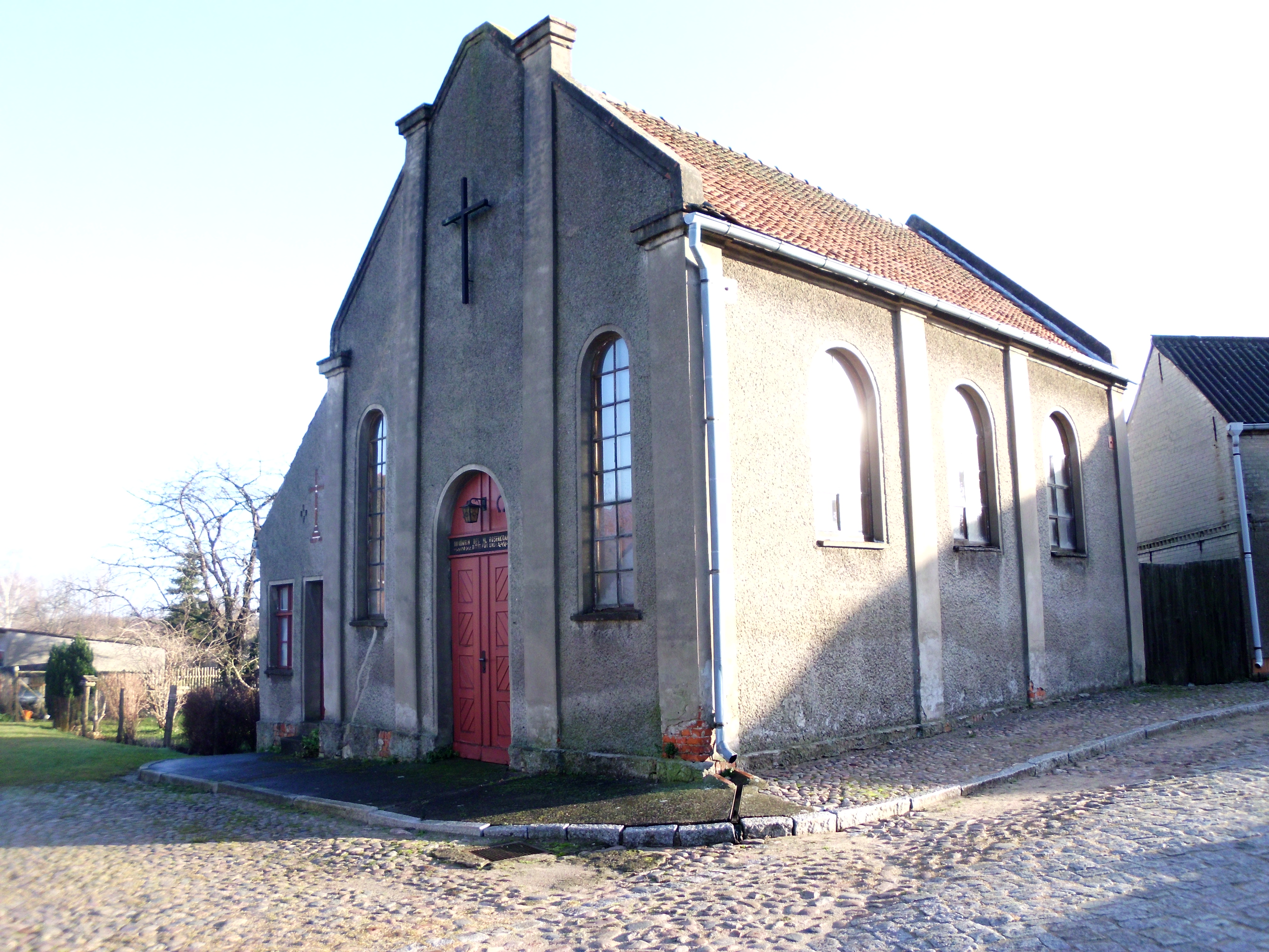 Katholische Rosenkranzkapelle in der Rhinstraße, Friesack, Landkreis Havelland